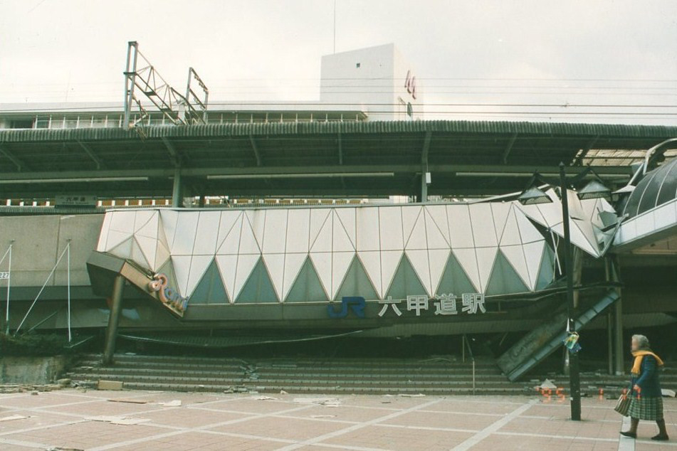 JR六甲道駅周辺（1995年1月17日）